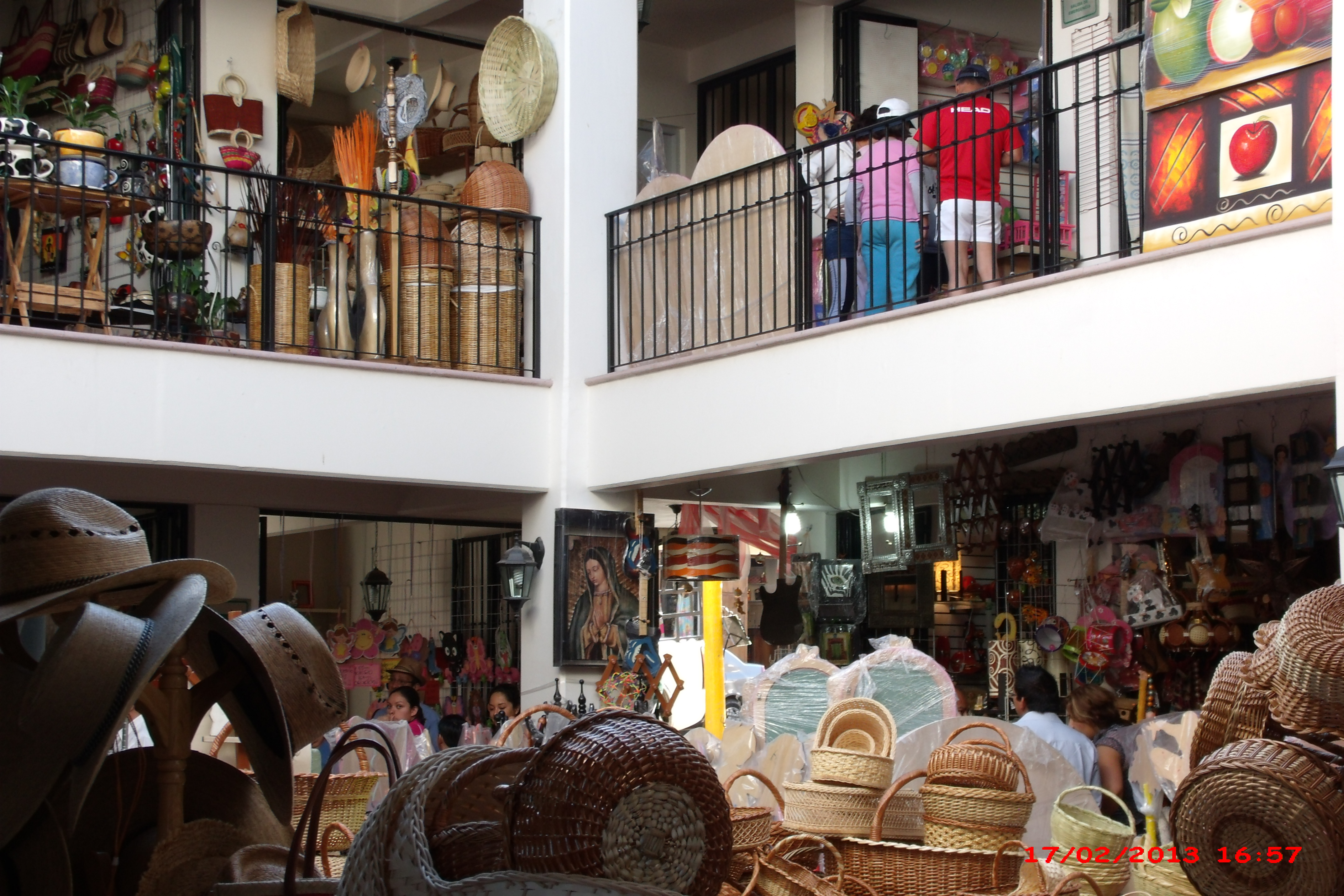 Mercado de artesanías de Tequisquapan.